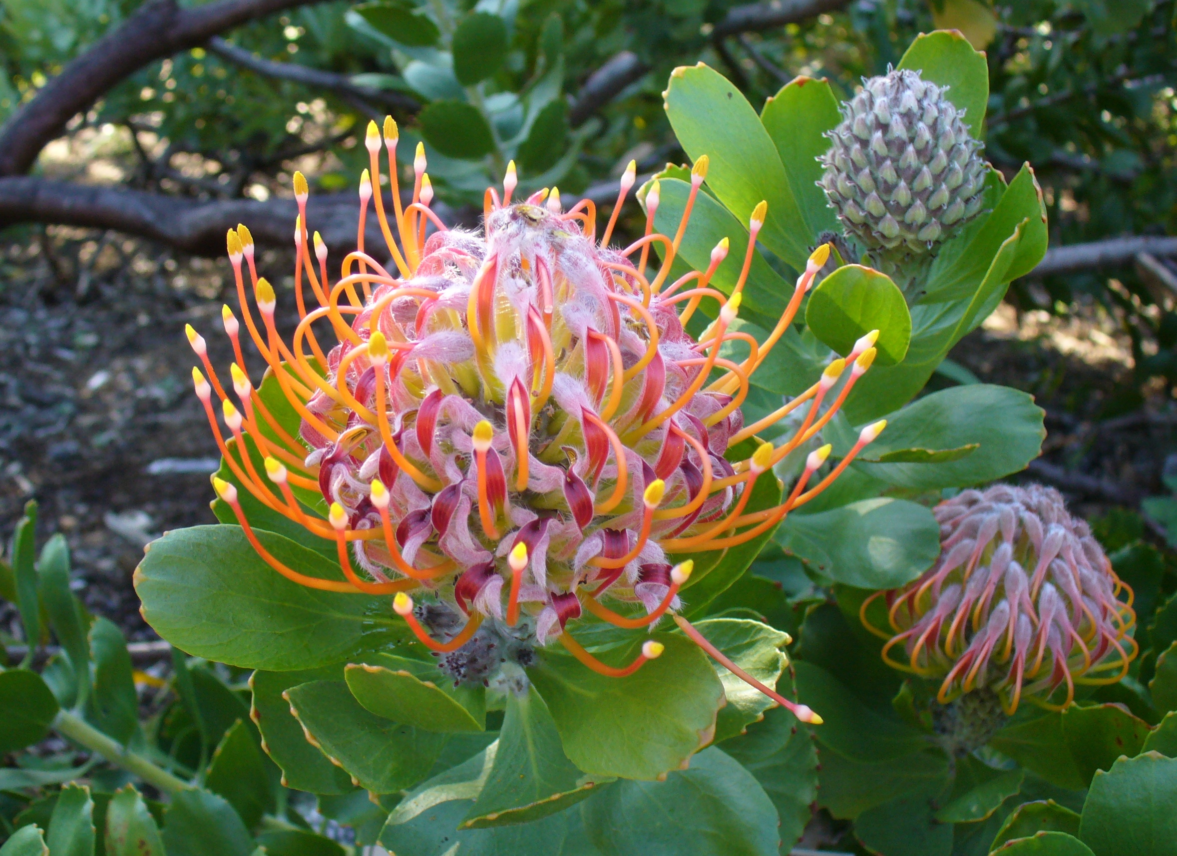 Kirstenbosch 2006 Andrew Massyn